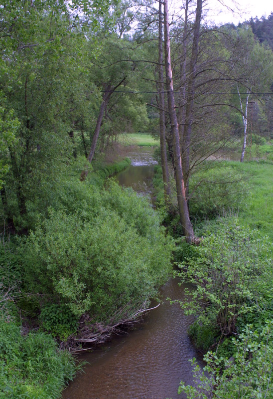 Ústí Javornice do Berounky u Zvíkovce.